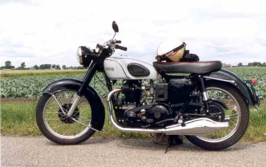 Toestemming van Peter Ritzen